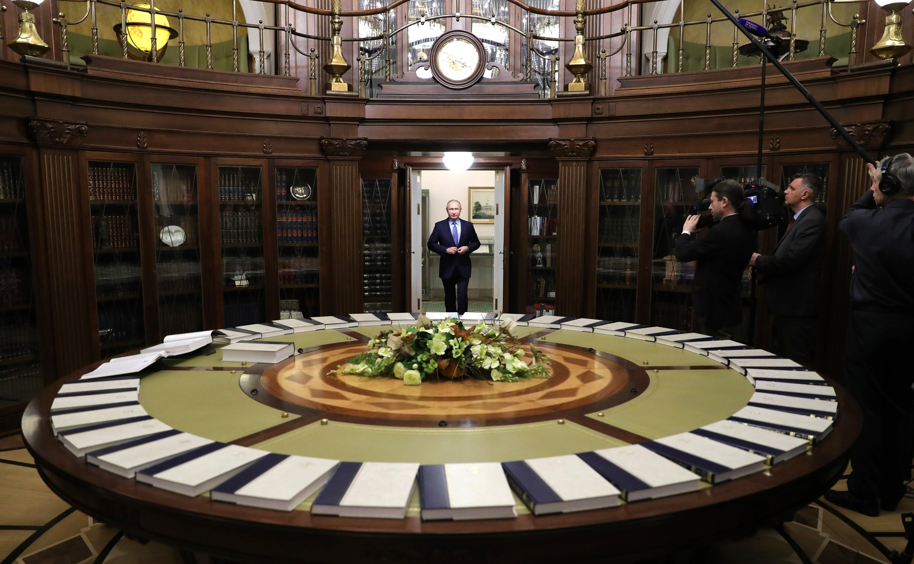 Академик РАН Юрий Осипов и ответственный редактор издательства «Большая российская энциклопедия» Сергей Кравец представили Владимиру Путину состоящее из 35 томов собрание Большой российской энциклопедии. Перед началом встречи с академиком РАН Юрием Осиповым и ответственным редактором «Большой российской энциклопедии» Сергеем Кравцом.